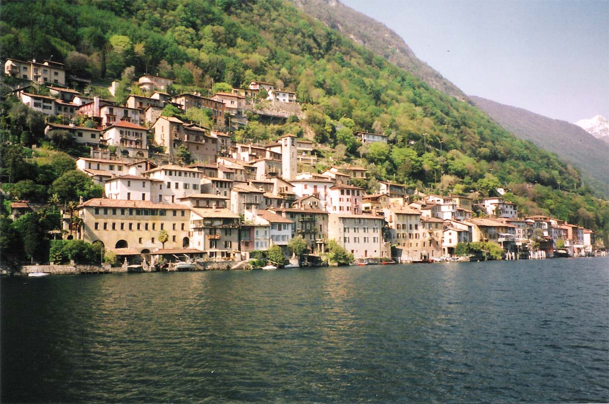 Beschreibung: Gandria am Luganersee (Lago di Lugano) im Tessin (Schweiz). Quelle: Urlaubfoto, 08.98 Fotograf oder Zeichner: Fabian Bolliger Lizenzstatus: GNU/FDL